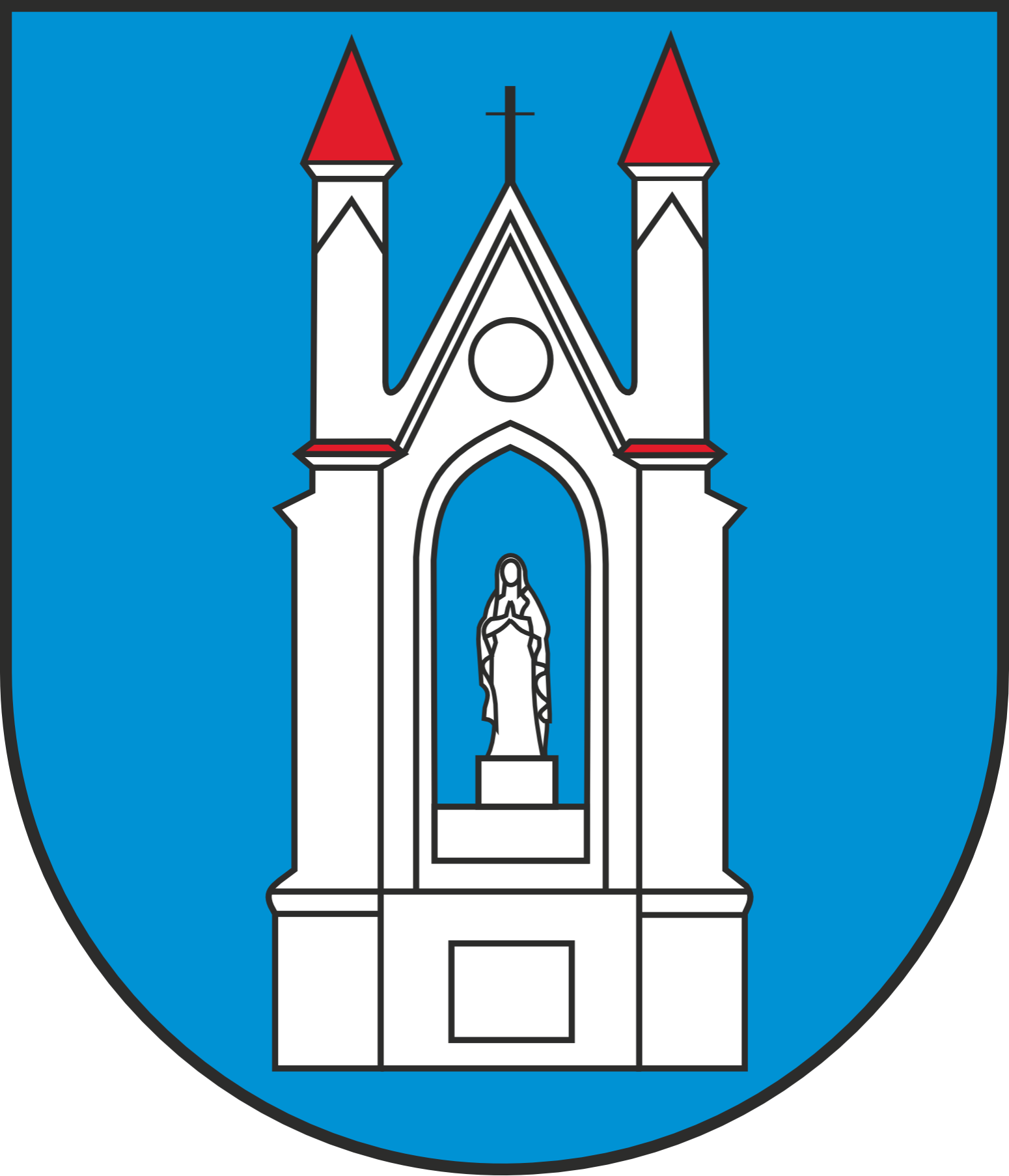 Herb gminy Lidzbark Warmiński